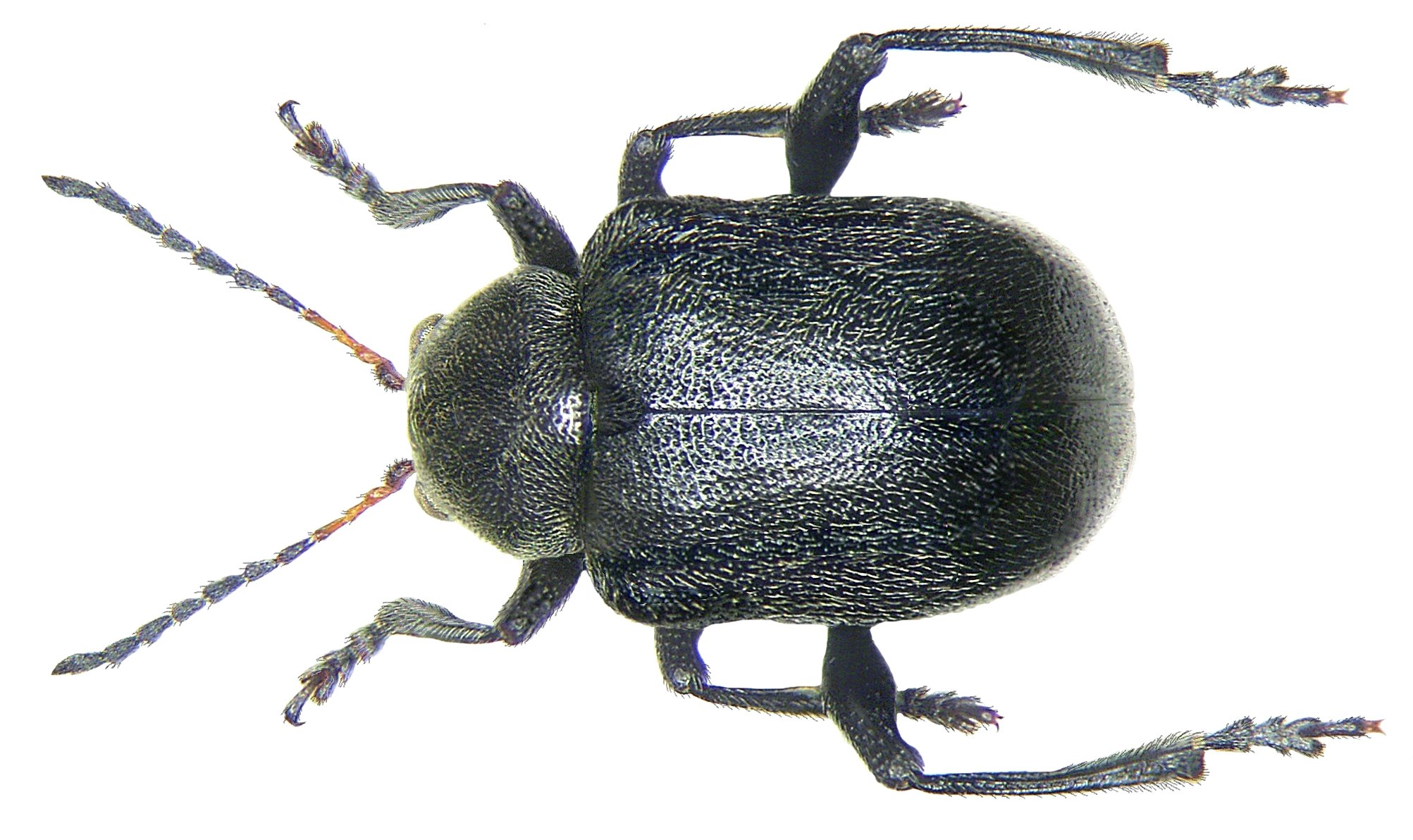 Familie; Chrysomelidae Grösse: 5-6 mm Verbreitung: Europa Ökologie: an Oenotheraceen Fundort: Germania, Bayern, Oberfranken, Selbitz leg. det. U.Schmidt, 2004 Foto: U.Schmidt, 2007